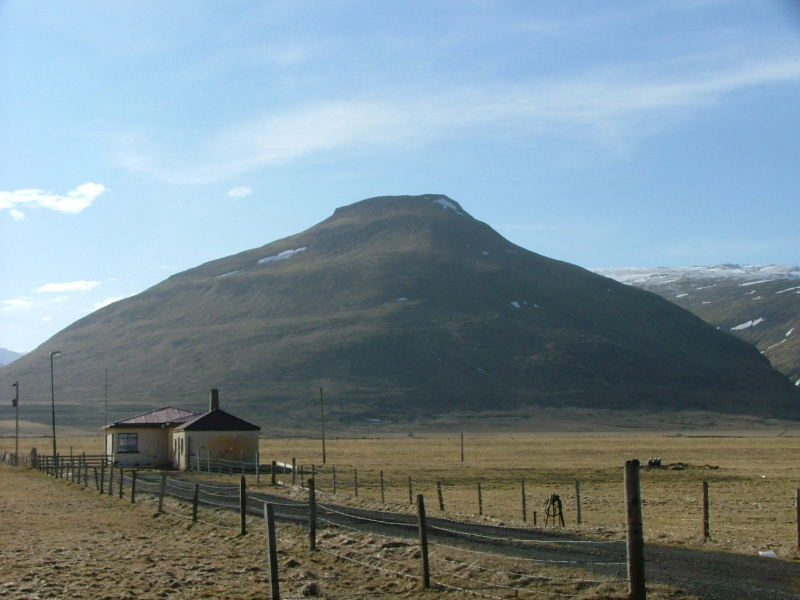 Klakkur stendur fyrir miðjum Kollafirði. Það er fagurmyndað fjall þar sem það gnæfir yfir byggðina. Undraland heitir býlið á myndinni.